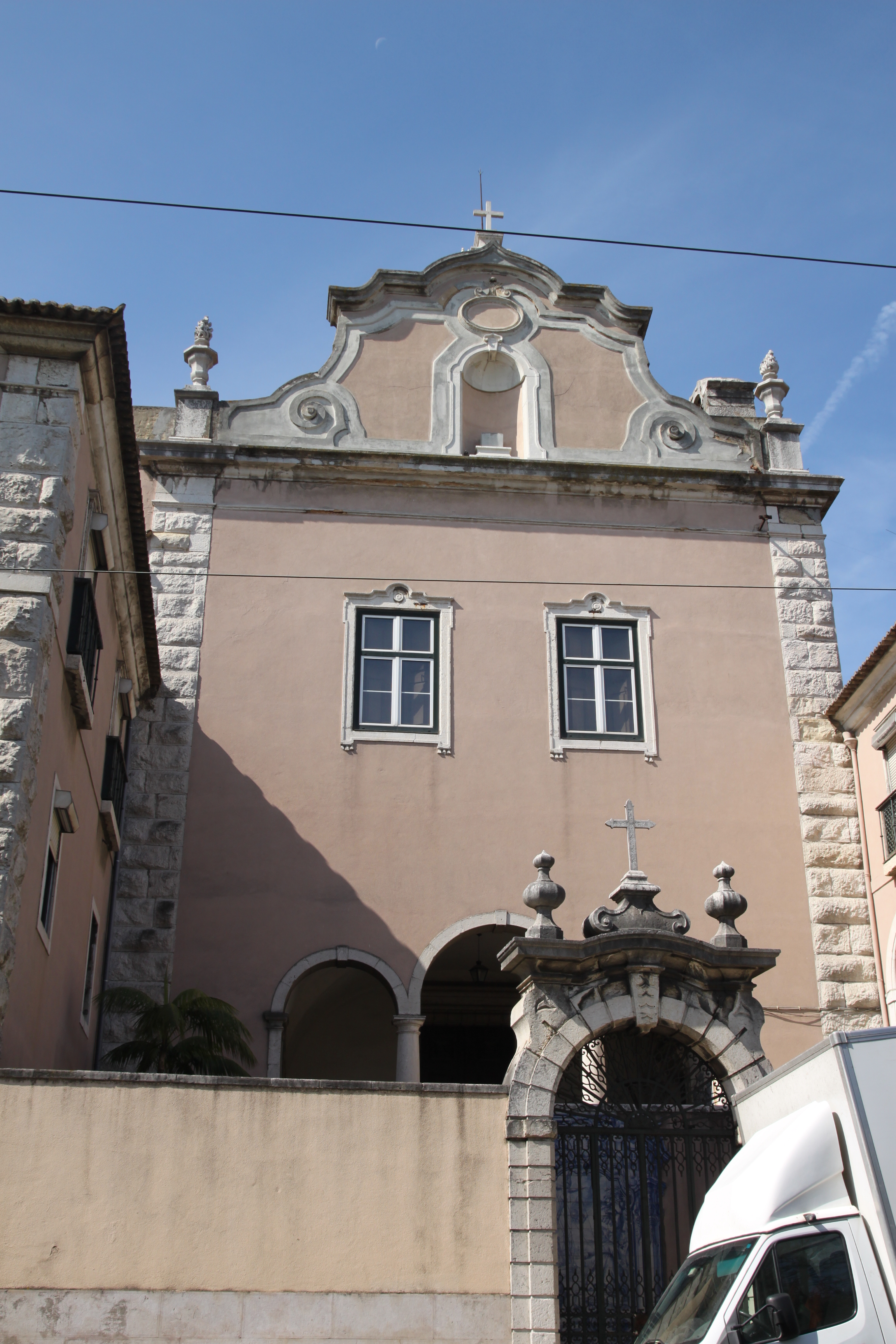 Convento de São Pedro de Alcântara This file was uploaded for Wiki Loves Monuments in Portugal with the unique identifier 97005077.